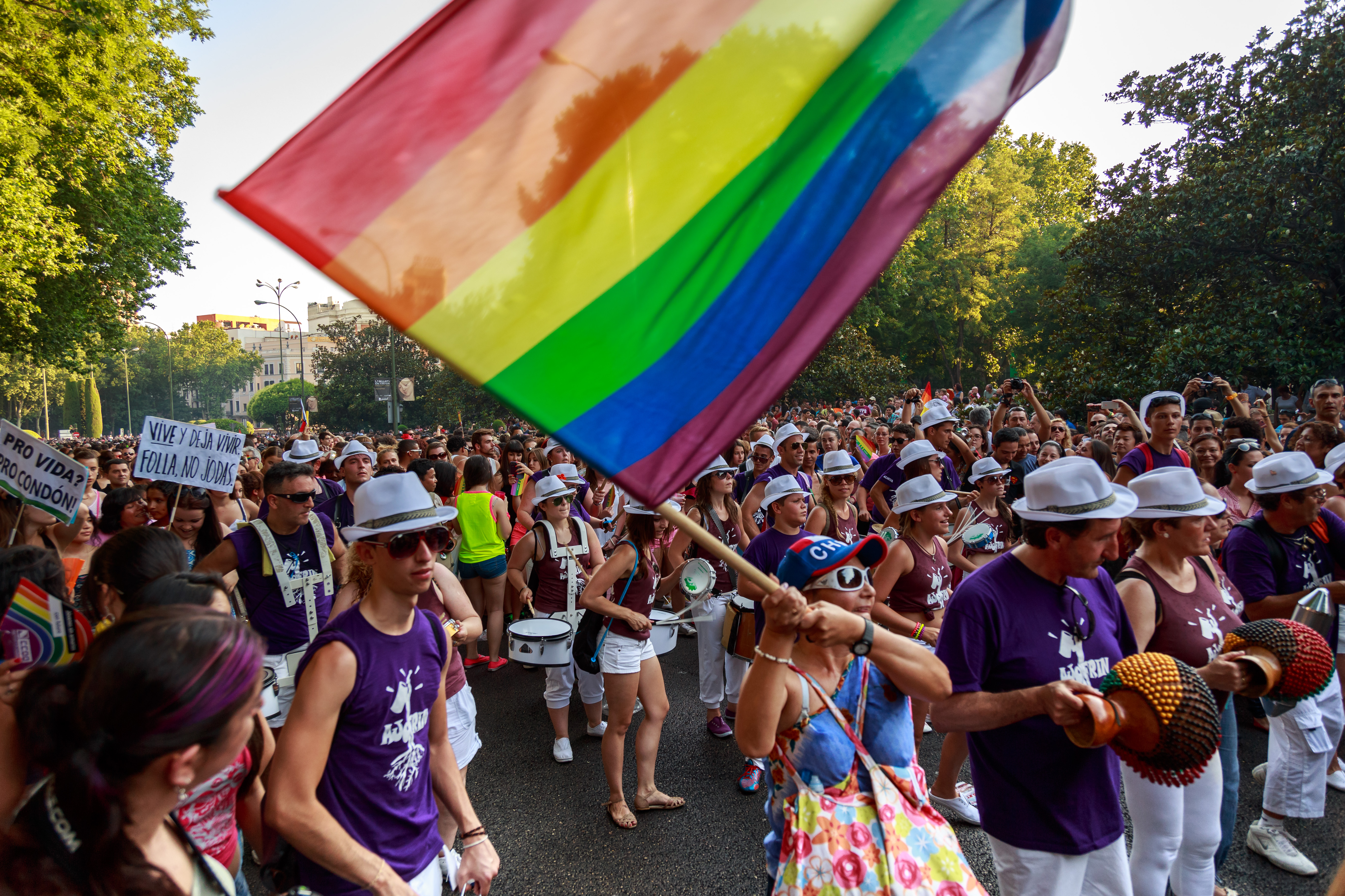 Desfile del orgullo gay en Madrid, 2013.